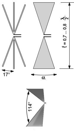 Beispiele für Flächendipole: Fächerdipol (oben) und der Schmetterlingsdipol (oder Spreizdipol), darunter ein nach vorn abgewinkelter Spreizdipol